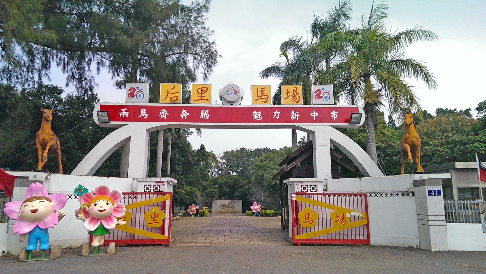 中文（台灣）: 臺中市后里區后里馬場入口。